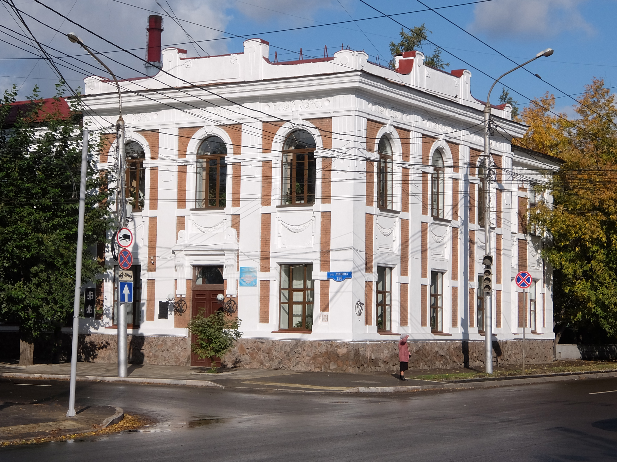 Городское начальное училище, Красноярск. 1911 г. архитектор: В.А.Соколовский